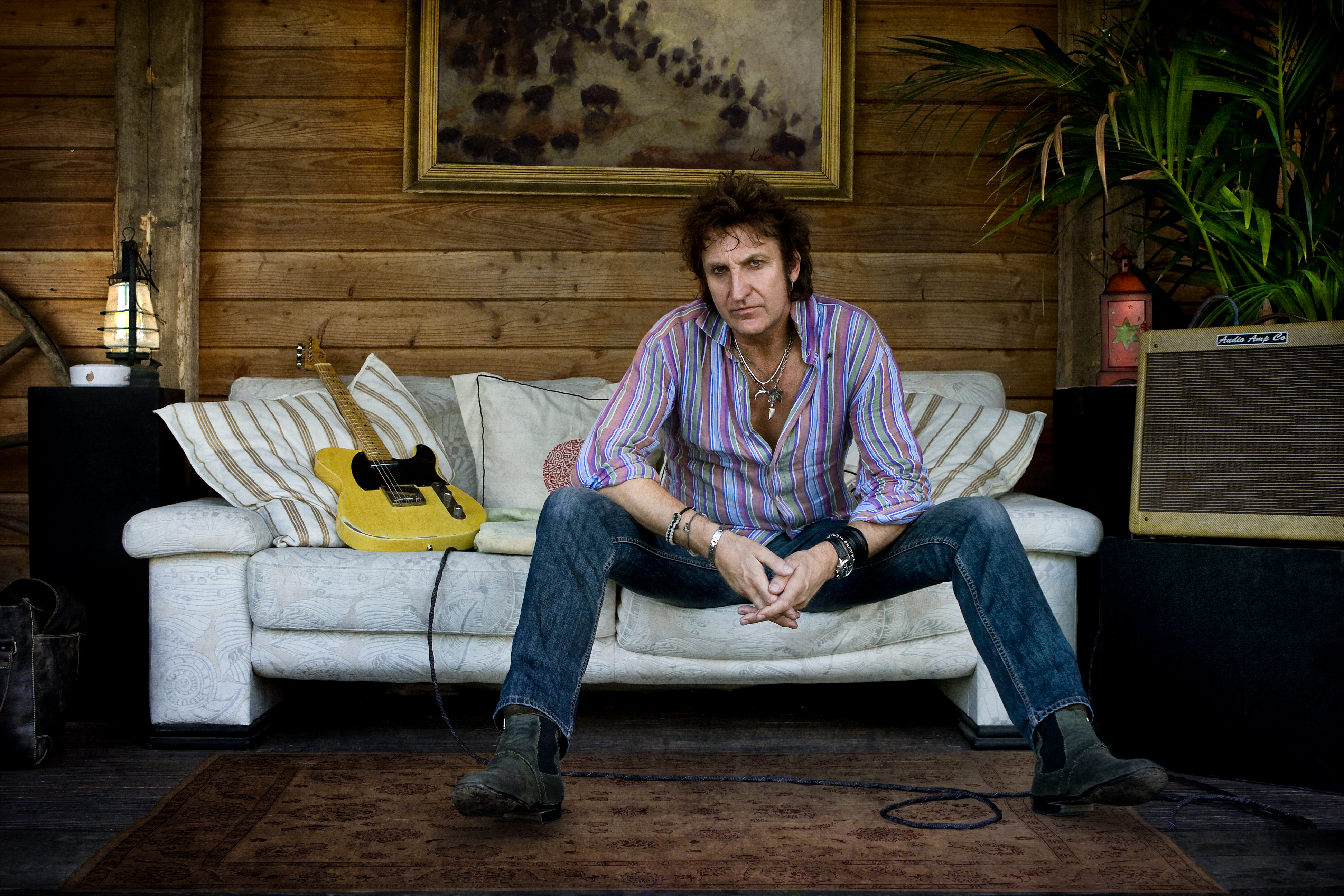 Carl Carlton